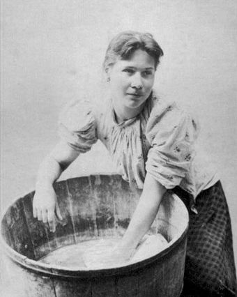 Беларуская (тарашкевіца): Вялае